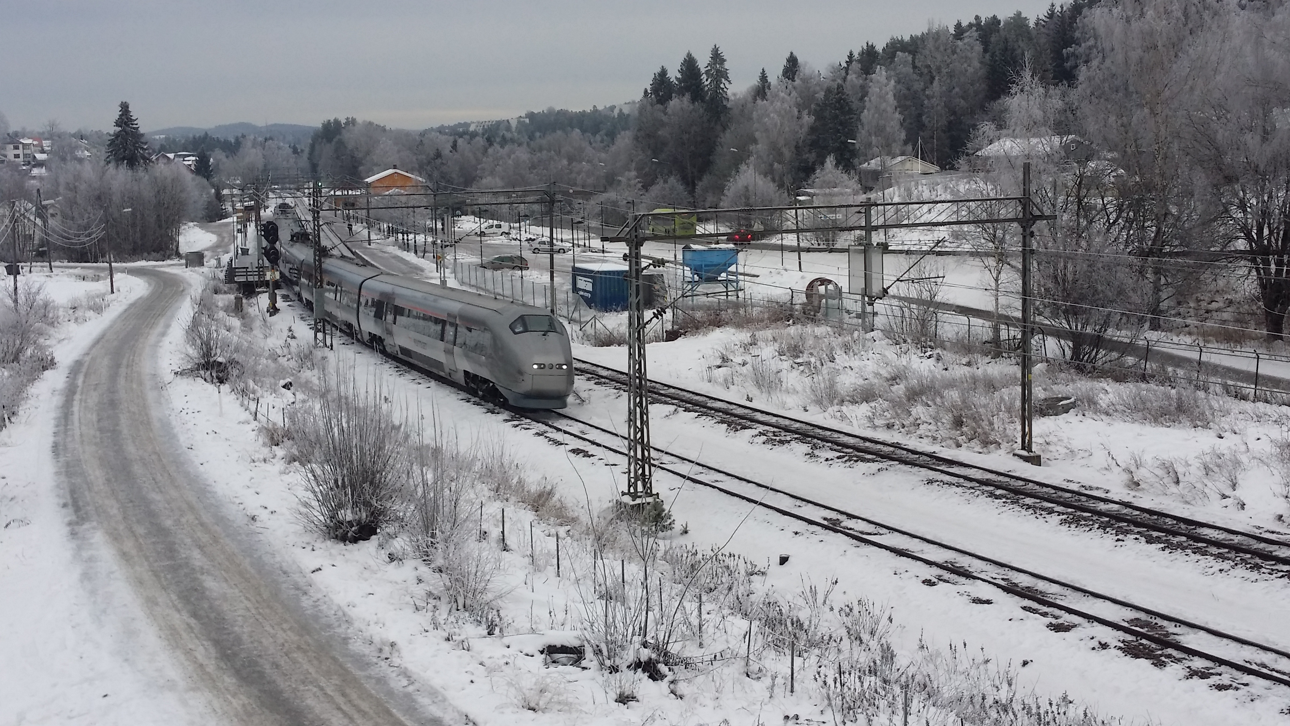 Langhus stasjon. Flytogsett som chartertog passerer.